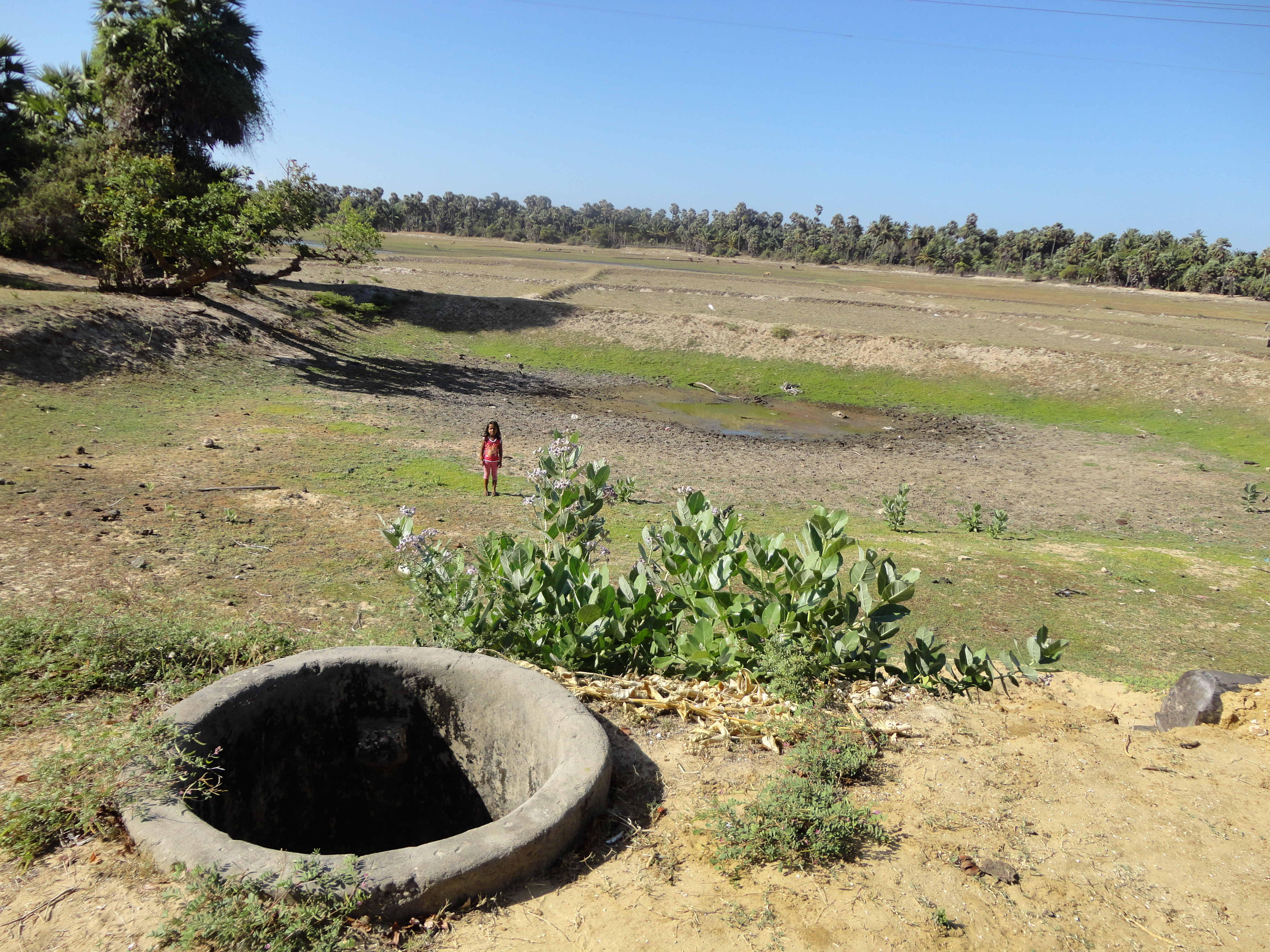 பாதிரி குளம் மற்றும் கிணறு